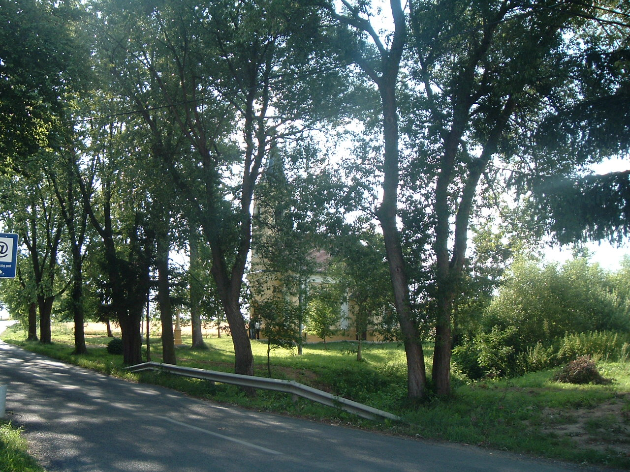 Kiszsidány